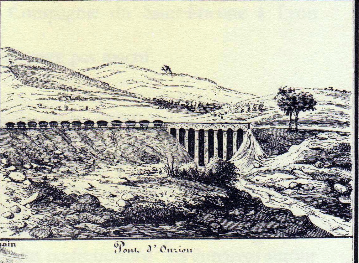 dessin